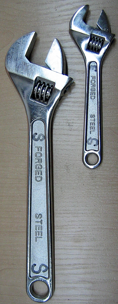 Tellitav võti